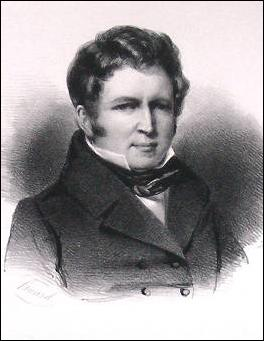 Jacques Coghen (1791-1858) homme politique et homme d'affaires, ministre des Finances